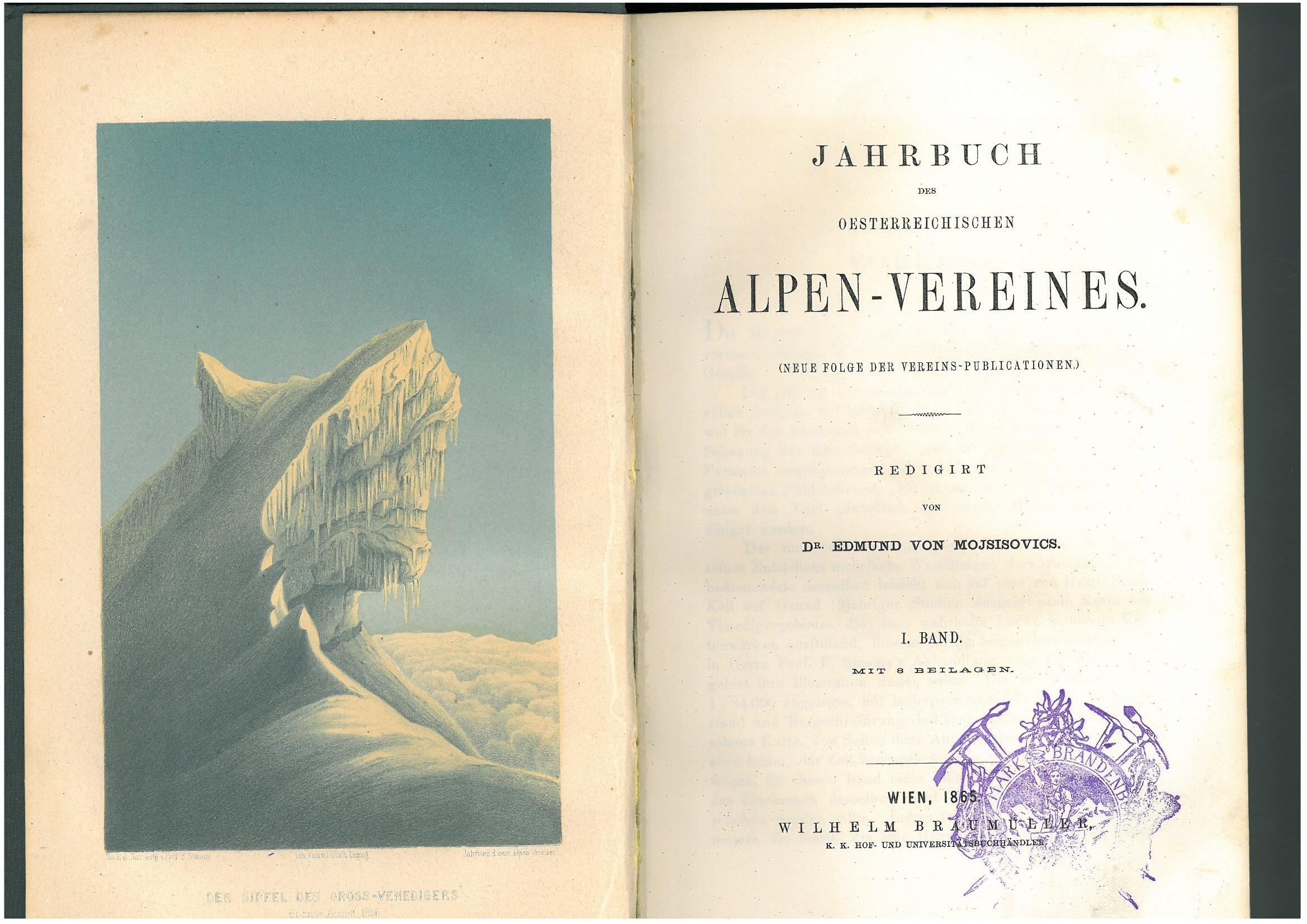 Erstes Jahrbuch des Österreichischen Alpenverein